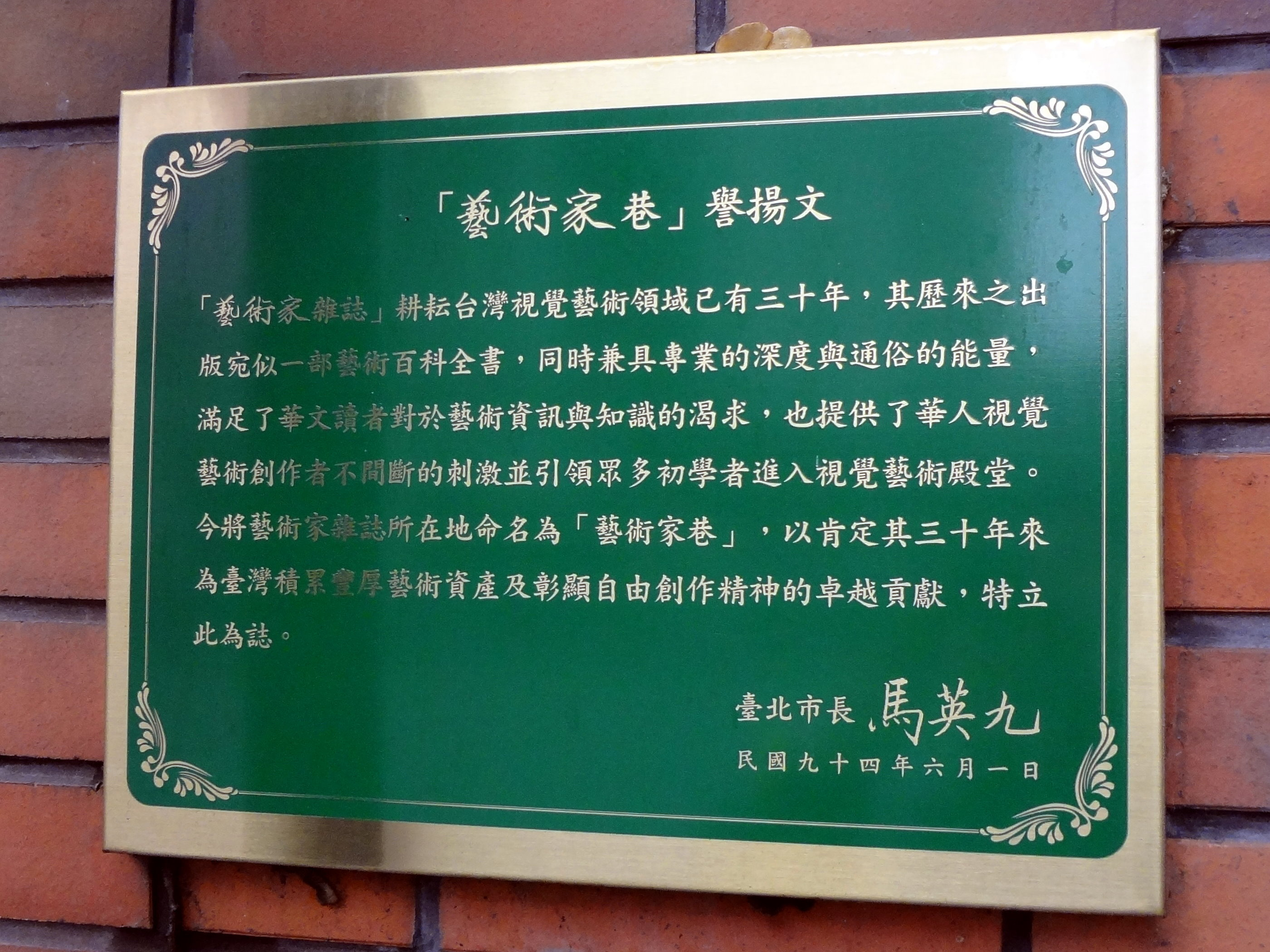 中文（台灣）: 臺北市中正區重慶南路一段147號（東華大樓）1樓外牆，藝術家巷譽揚文，2005年（中華民國94年）6月1日臺北市市長馬英九撰。